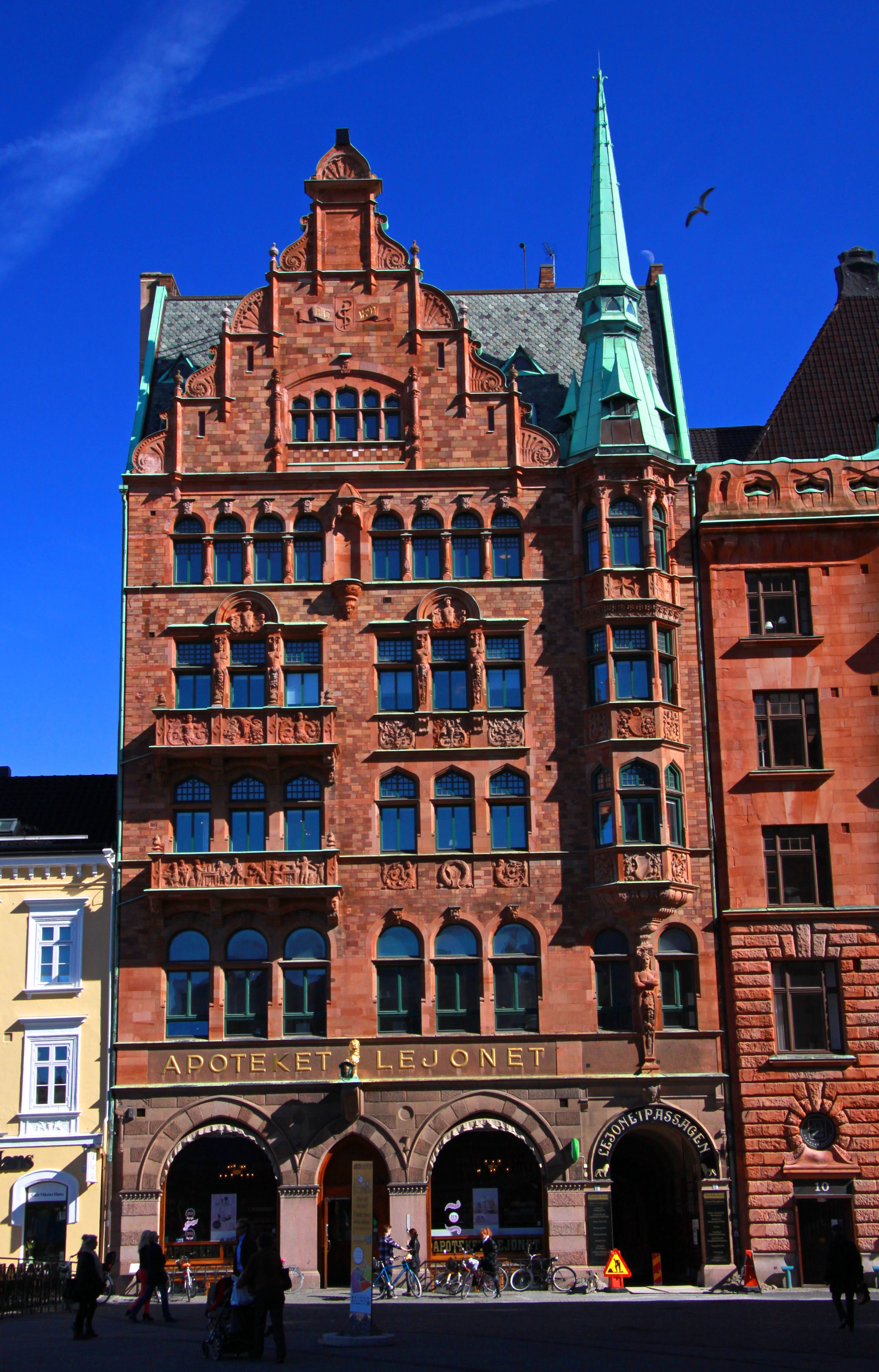 Malmö. På Stortorget.